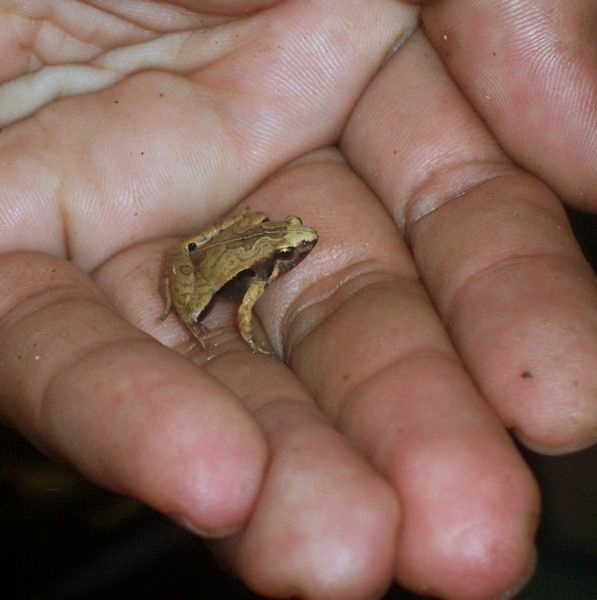 Nouvelle version de File:Mihyla achat 070403 3320 tdp.jpg - Correction couleur